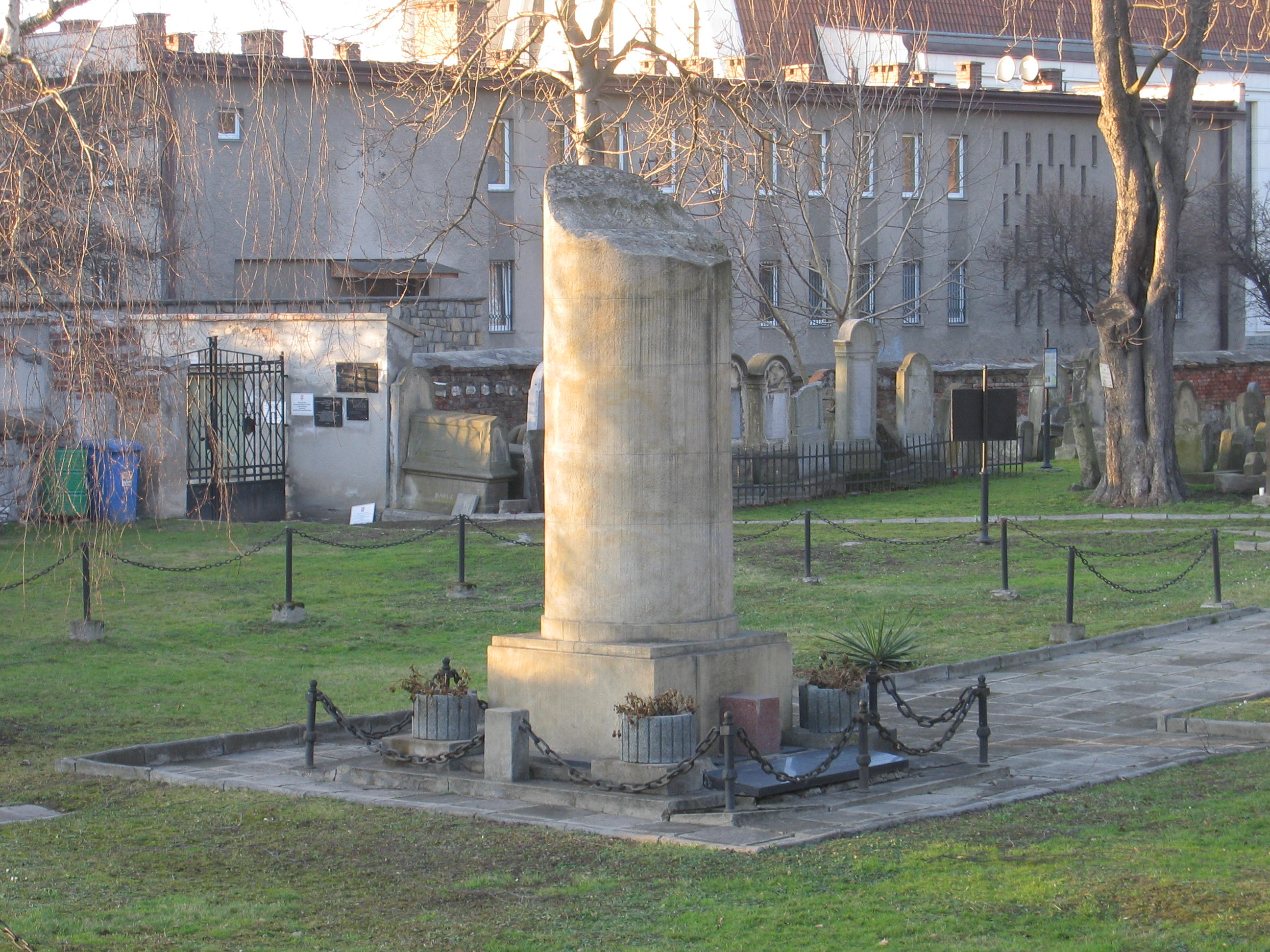 Pomnik na cmentarzu żydowskim w Tarnowie